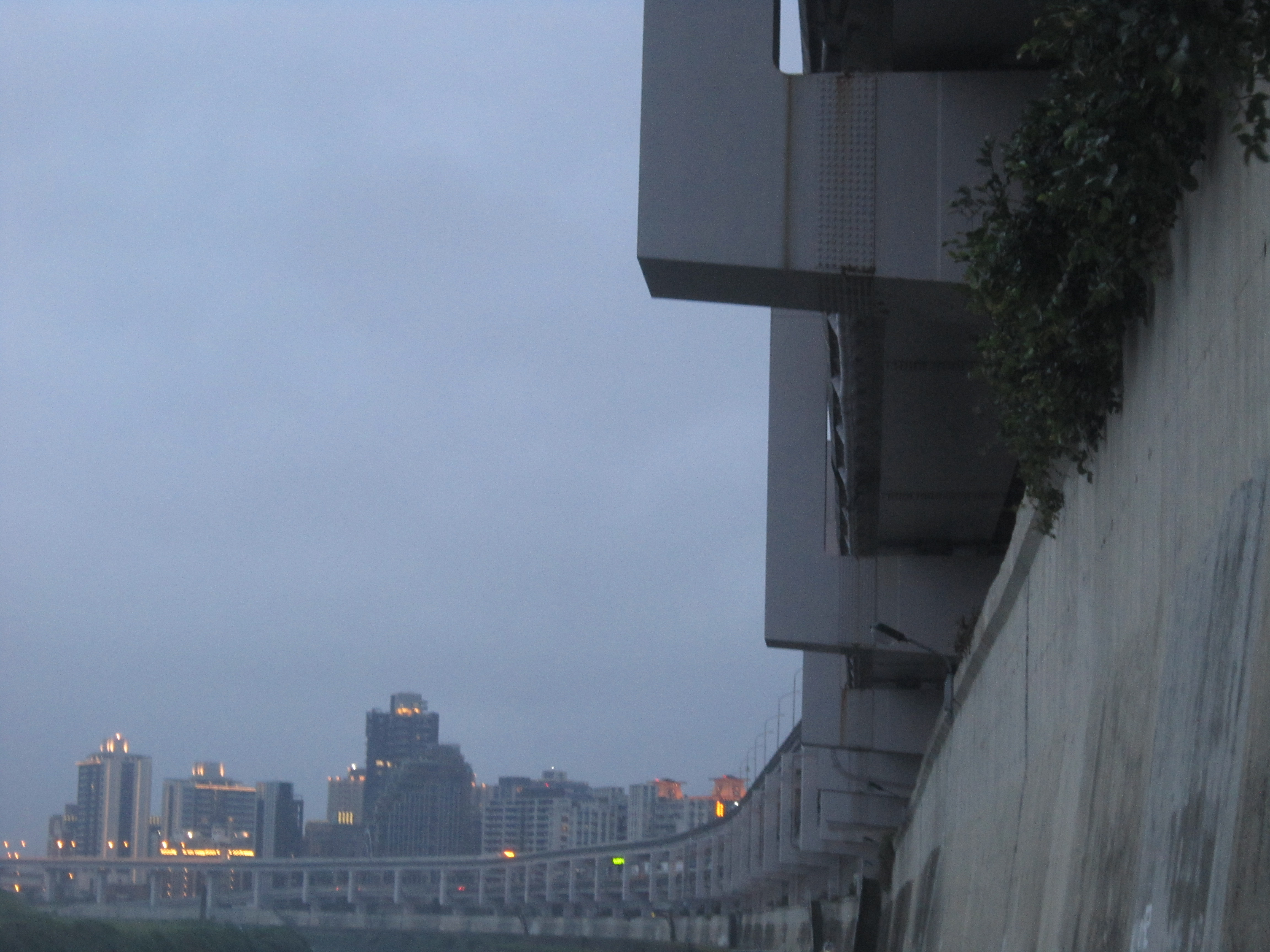 中文（台灣）: 環東大道基隆河段。